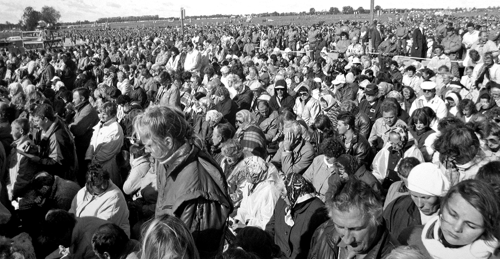 250.000 kom till mässan vid Korskullen 7 sep 1993.